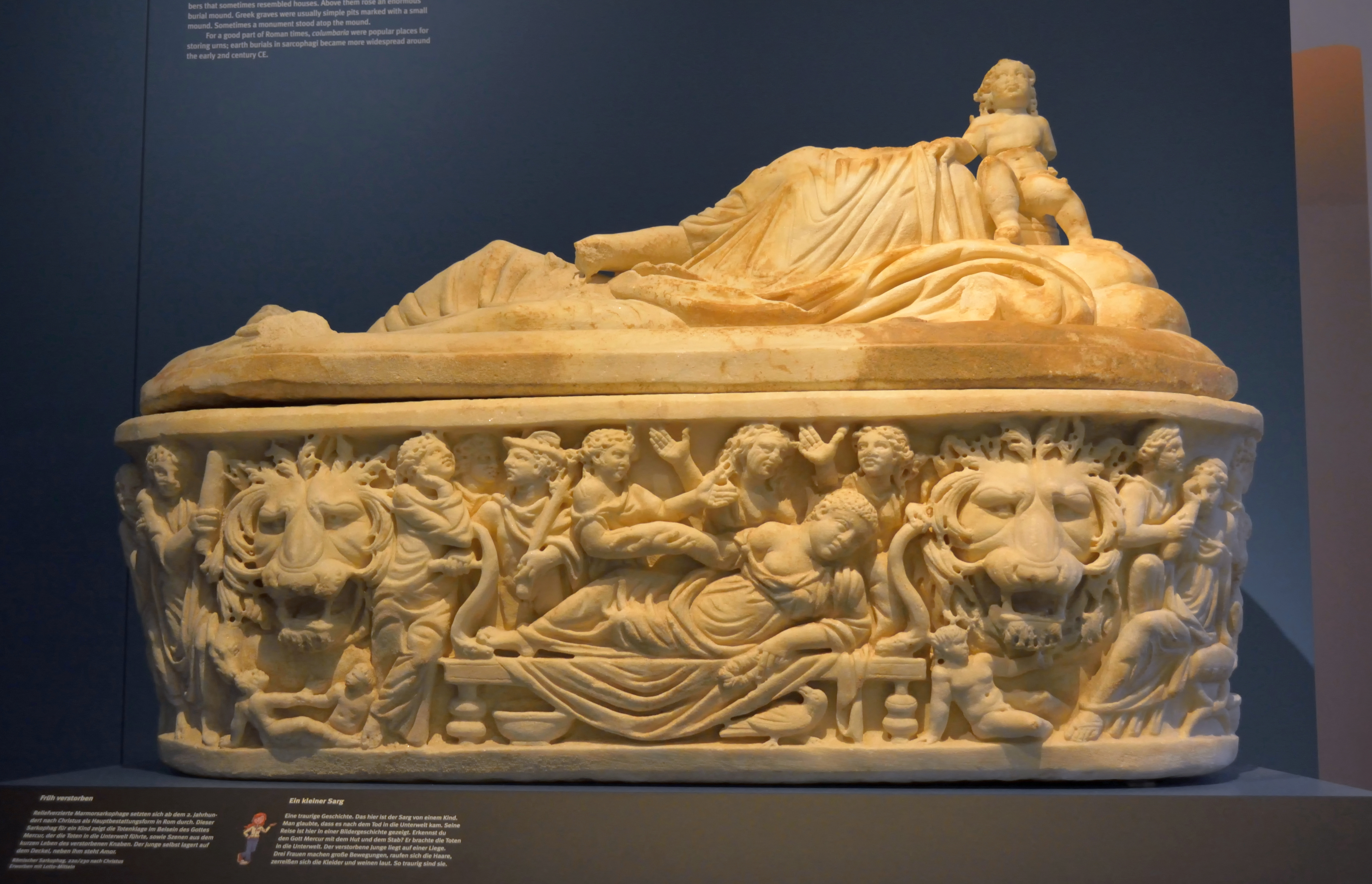 Impressionen aus dem Landesmuseum Württemberg in Stuttgart. Ausstellungsteilbereich "Wahre Schätze", hier "Antike" Ein Kindergrab